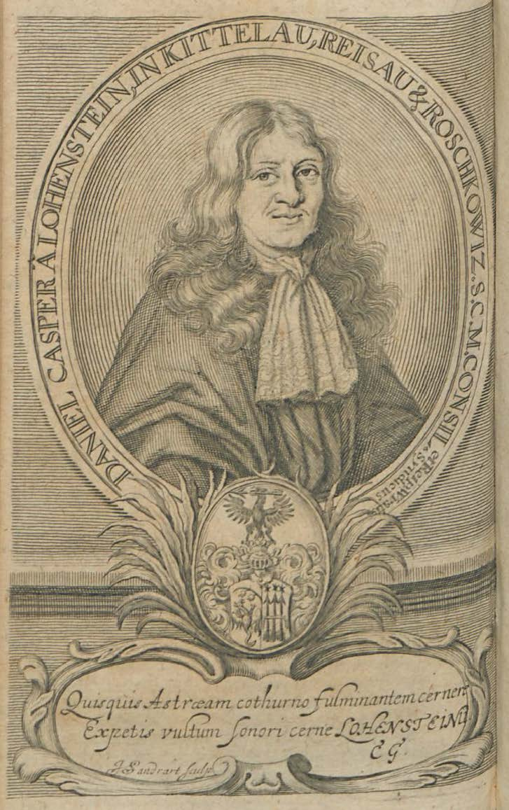 Kupferstich von Daniel Casper von Lohenstein. Signiert von J. Sandrart.